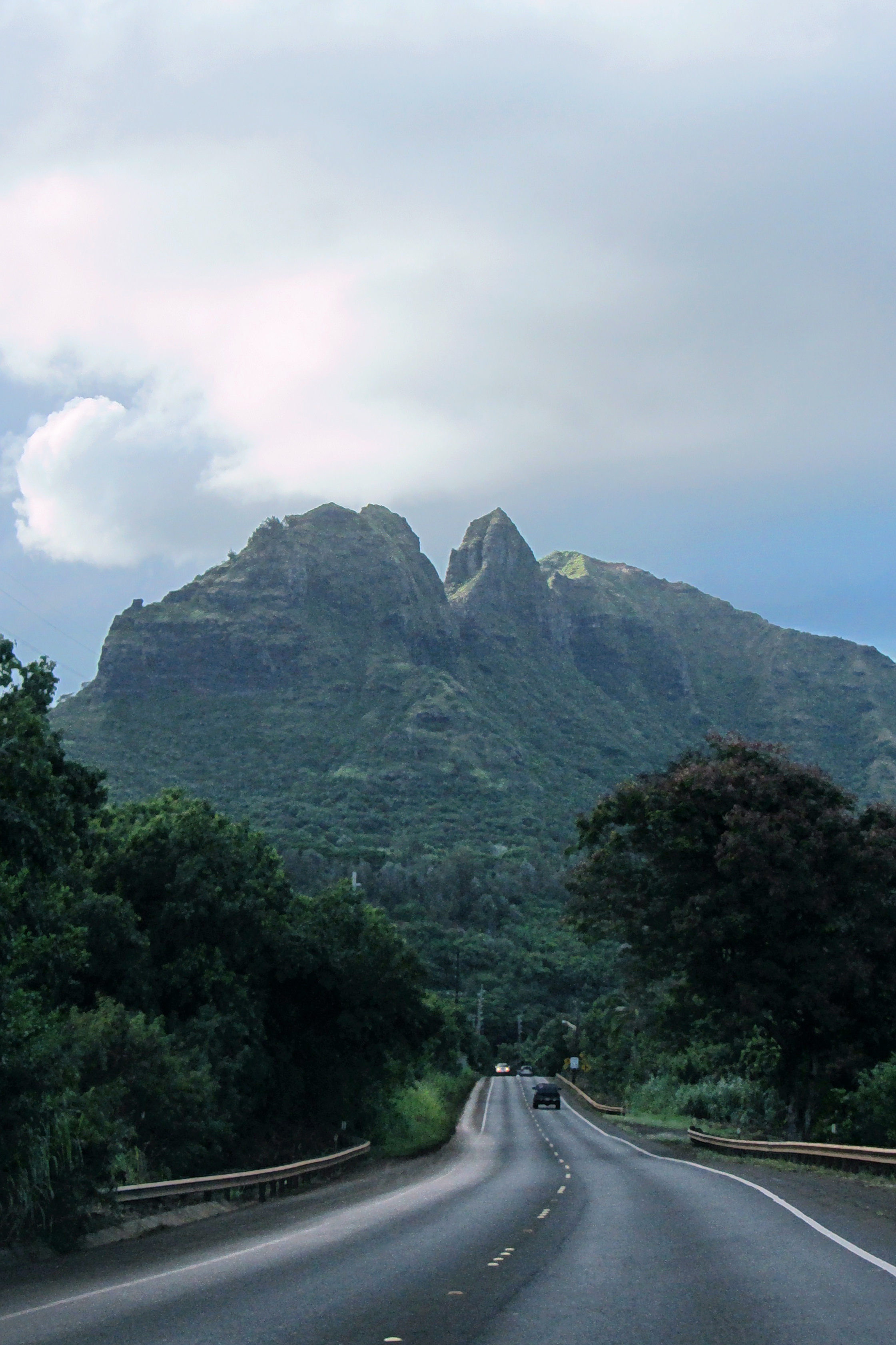 Kalalea (King Kong) Mountain from Kuhio Hwy, Anahola